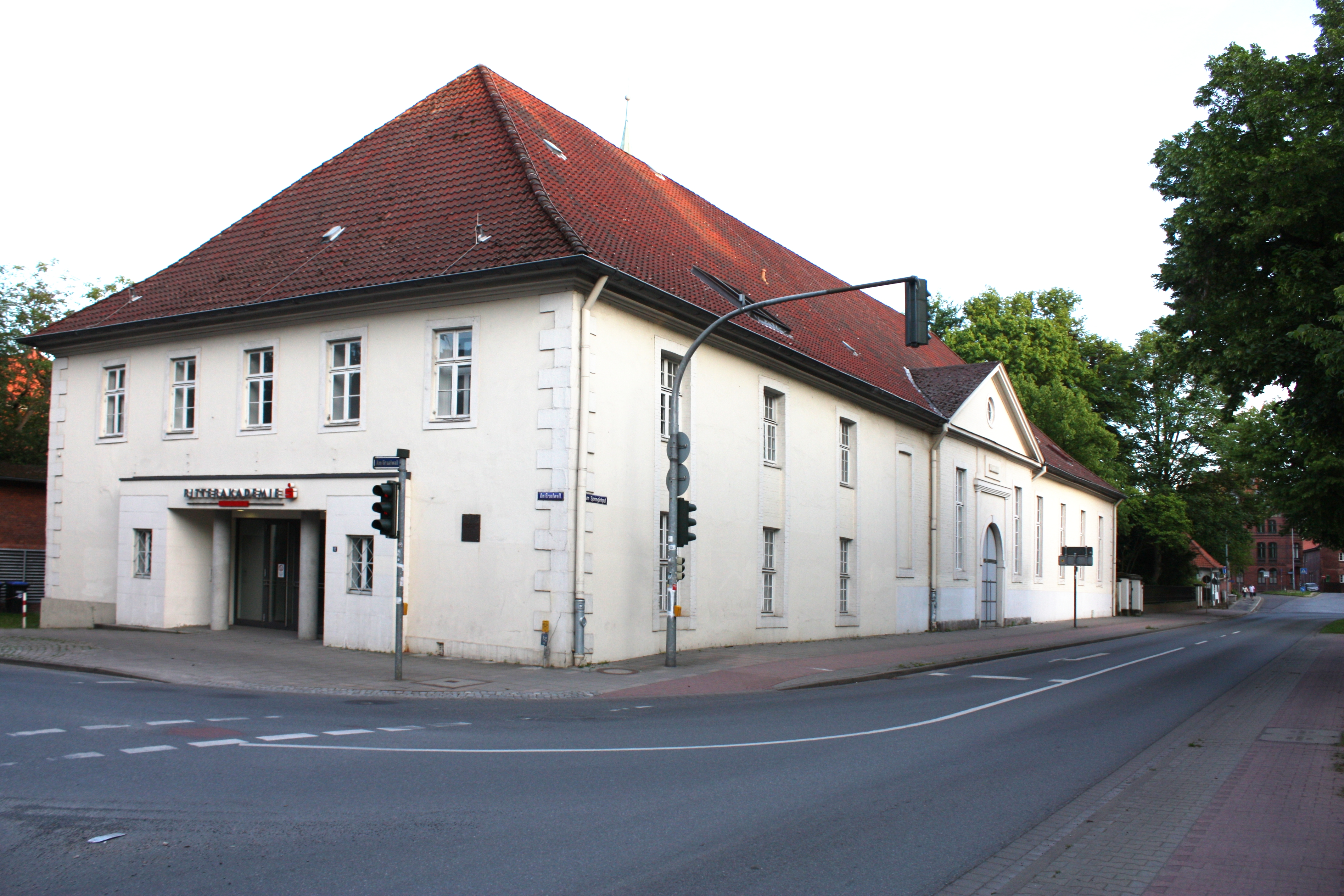 Kommunikationszentrum "Ritterakademie" der Sparkasse Lüneburg, Am Graalwall 12, Lüneburg, ehem. Reithalle der Ritterakademie, erbaut 1790